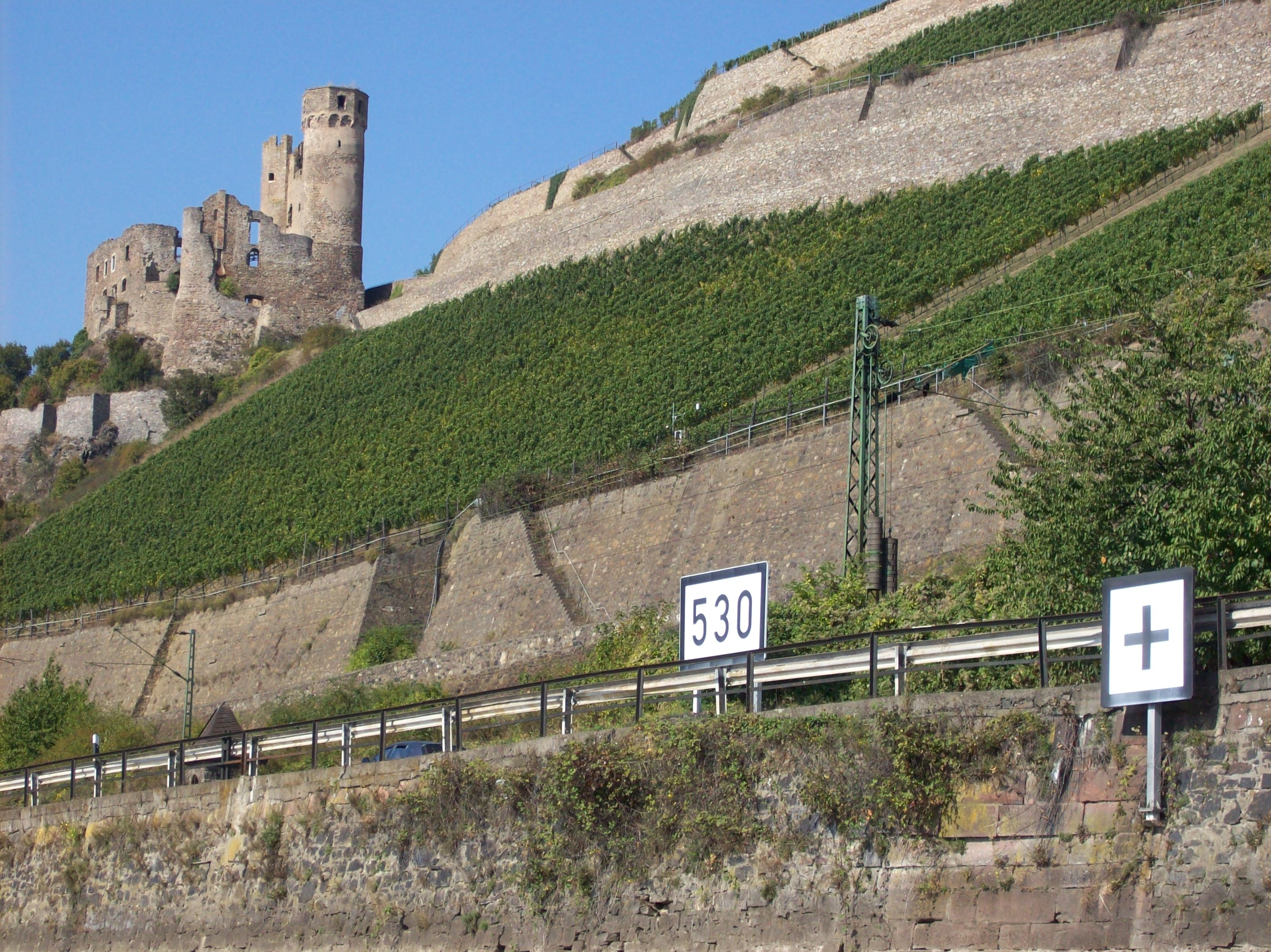 „Kurzer" Kilometer bei Bingen im Rhein.